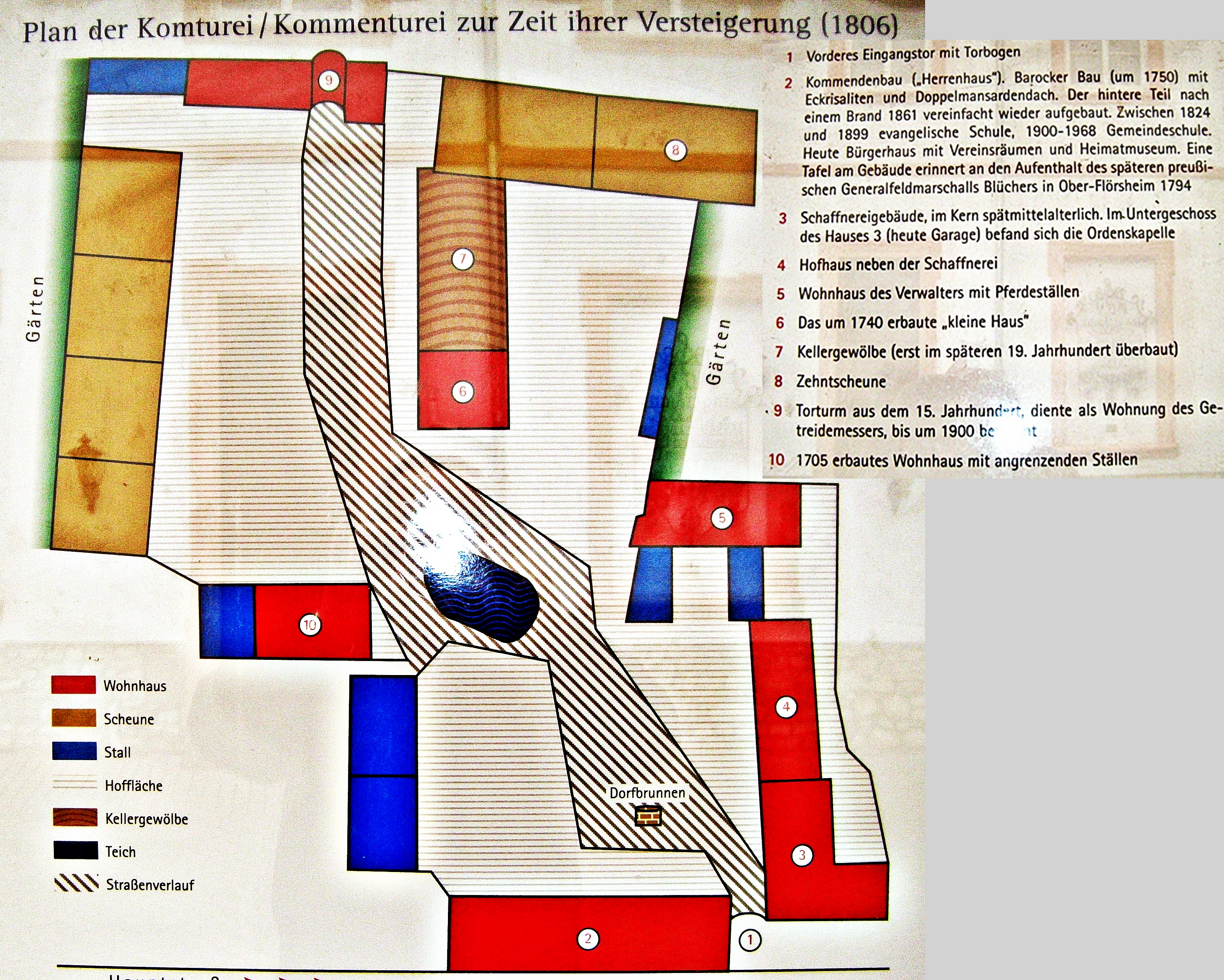 Foto vom Plan der Deutschordenskommende Ober-Flörsheim. Foto von öffentlich im Freien aufgestellter Tafel.